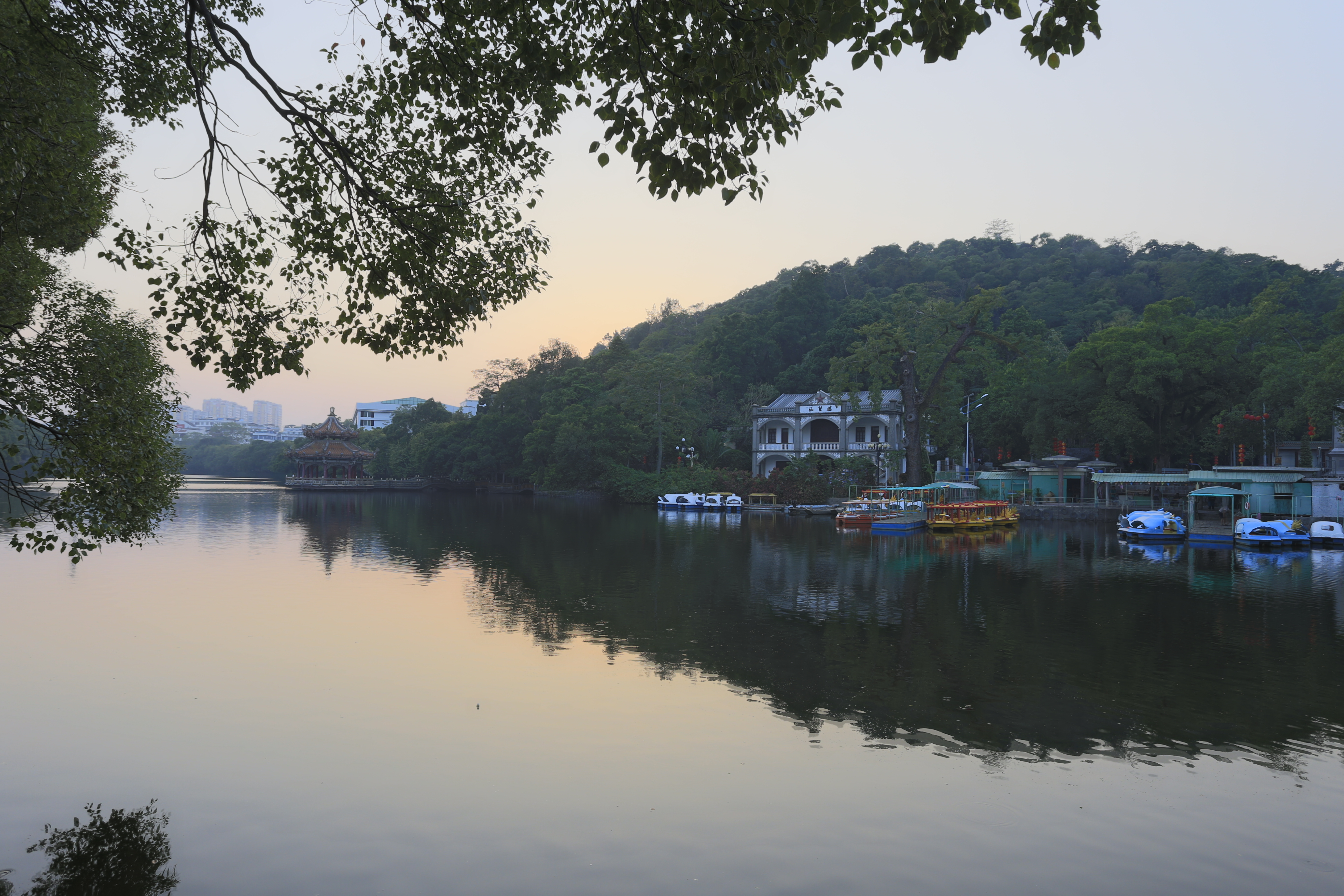 潮州涵碧楼